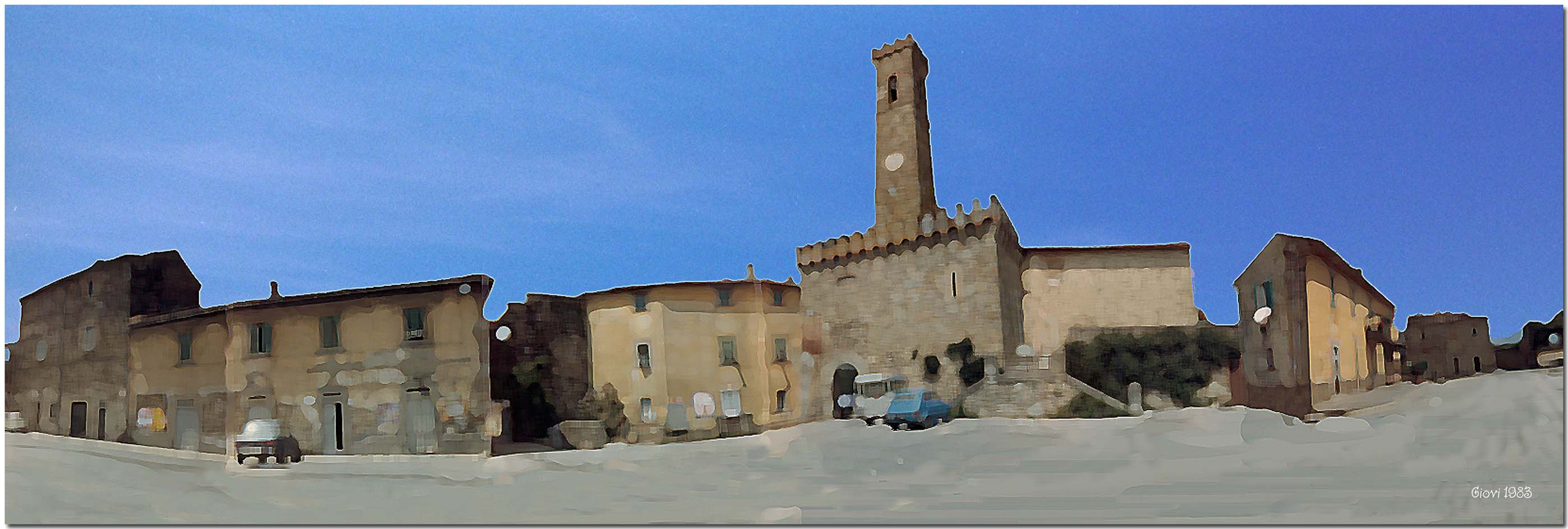 Foto panoramica di Giovi